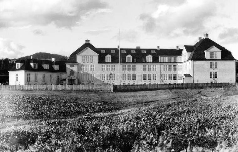 Ris skole.